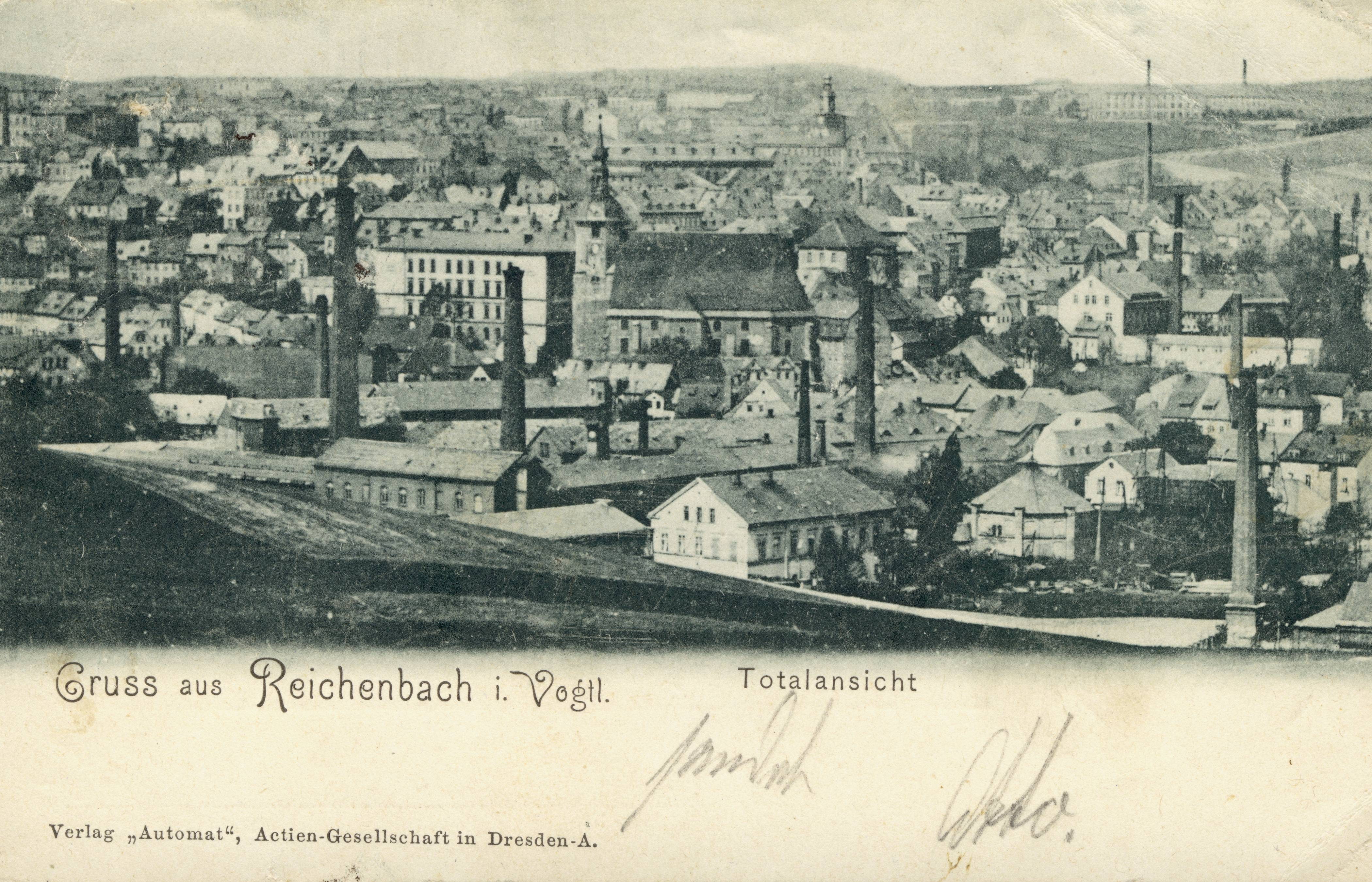 Blick über Reichenbach im Vogtland und die Firma Georg Schleber AG im Vordergrund